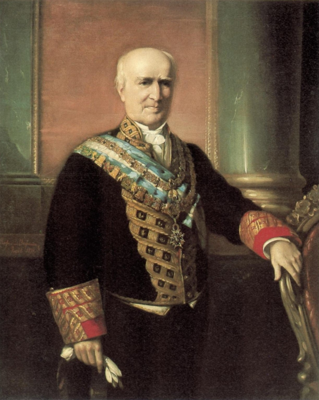 Retrato de Francisco Santa Cruz (1797-1883). Gobernador del Banco de España de noviembre de 1863 a abril de 1866.